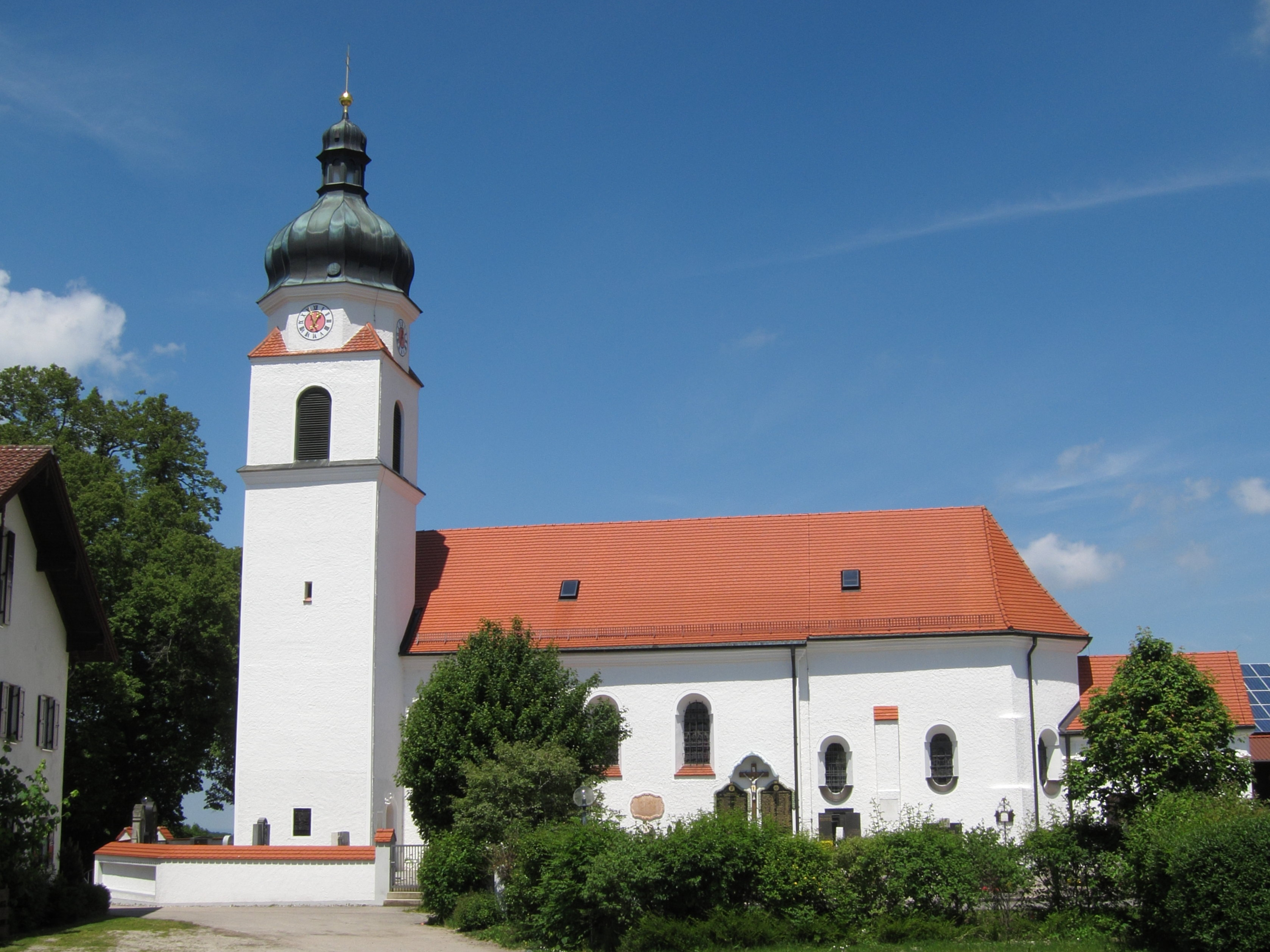 Pemmering; katholische Pfarrkirche St. Margareth, langgestreckter Saalbau mit leicht eingezogenem polygonalem Chorabschluss, angefügter Sakristei und Westturm mit Spindelhelm, Chor spätgotisch, Langhaus 17./18. Jahrhundert, nach Brand 1776 umgebaut.